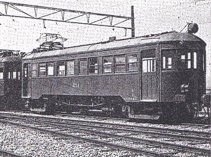 名鉄モ450形電車。各務原鉄道KB1形として1925年新製。名鉄揖斐線忠節駅にて撮影。